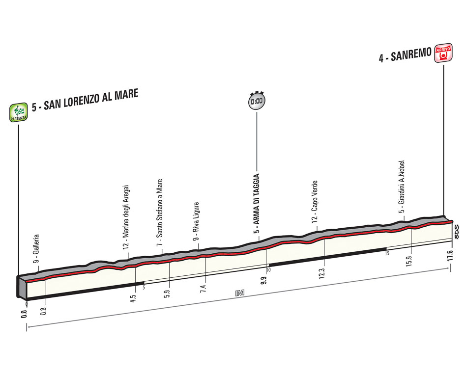 Tappa 1 Giro 2015